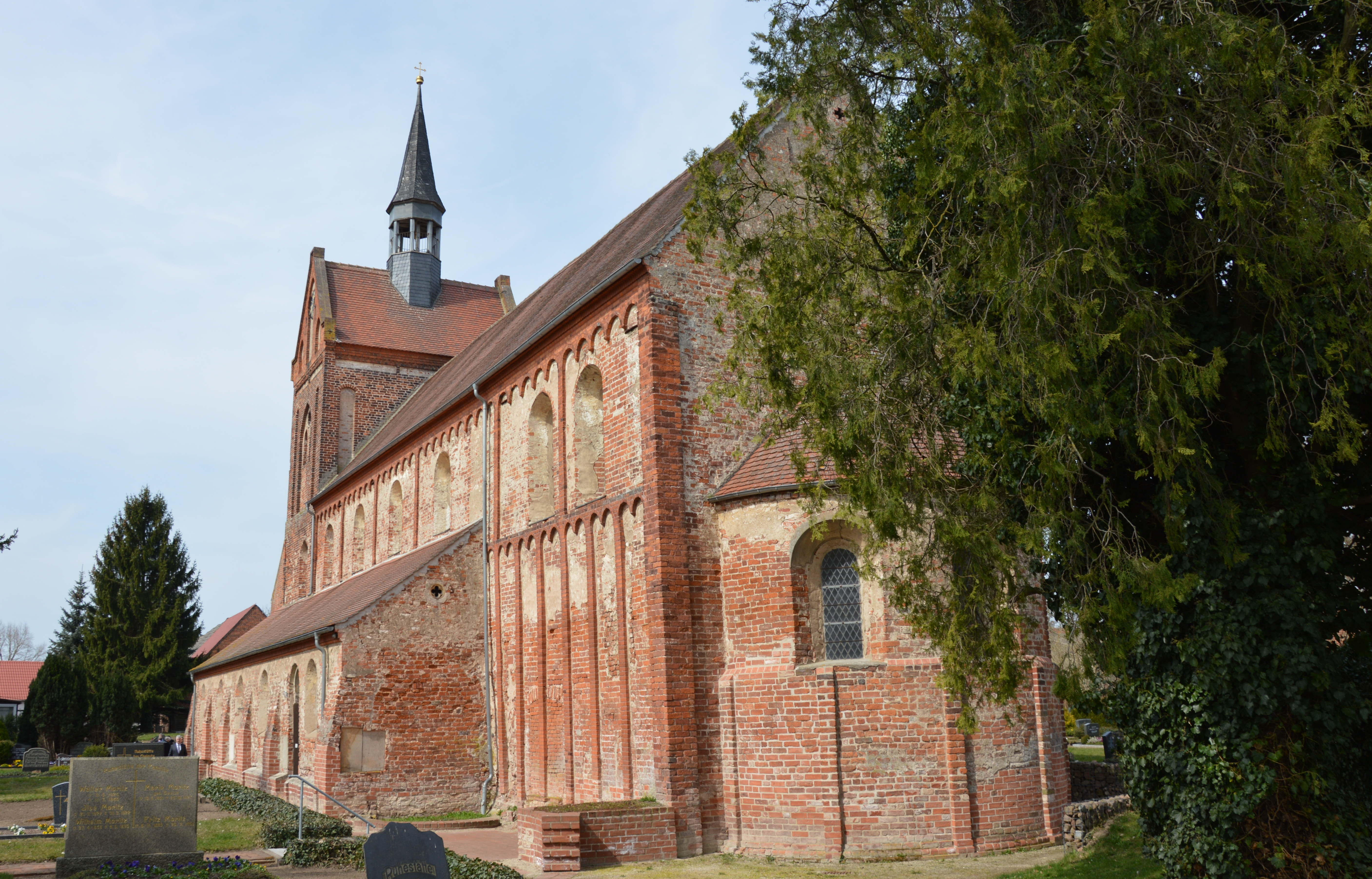 Kirche in Beuster